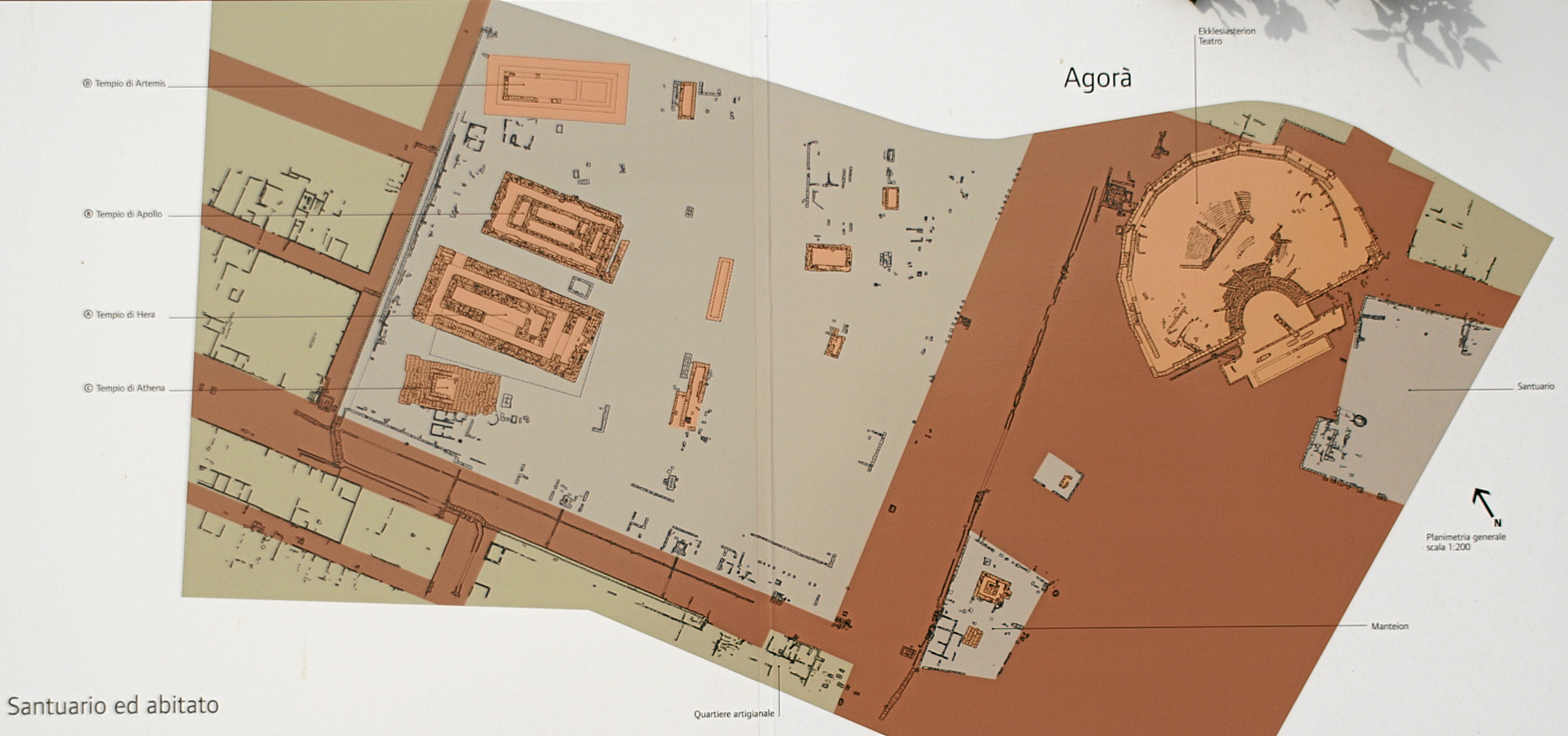 Metaponto: Plan des archäolog. Geländes